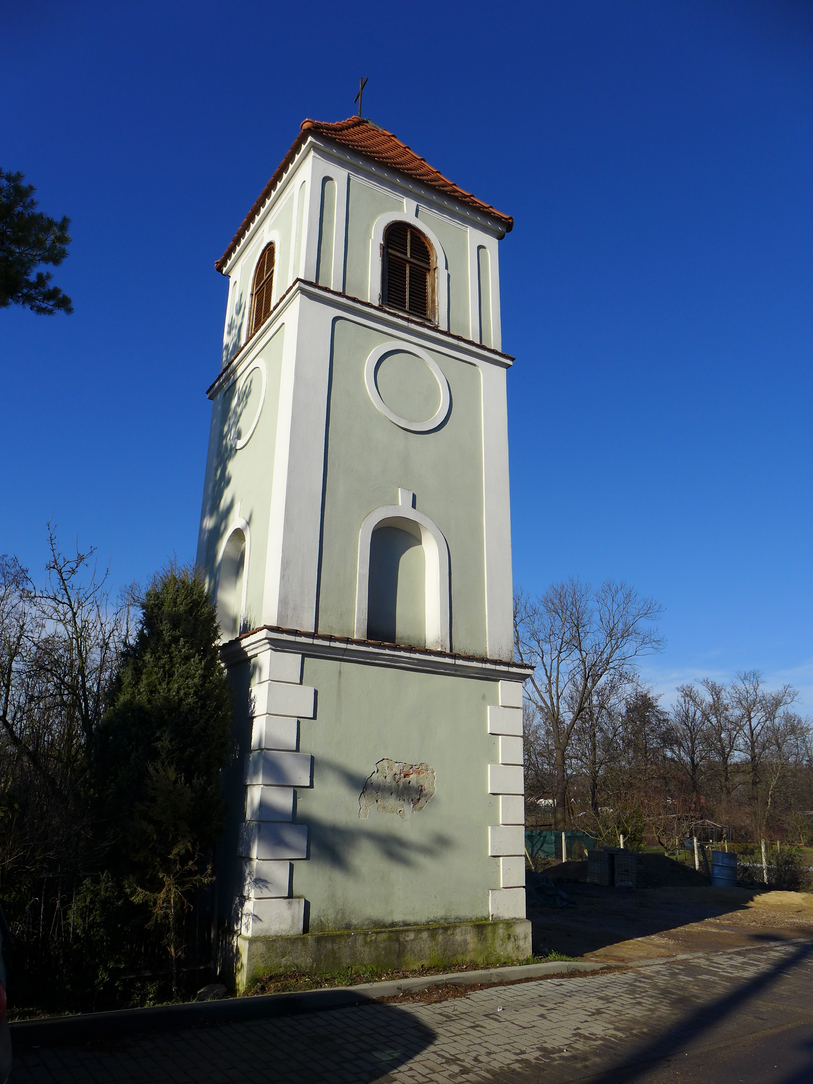 Zvonička, Nesachleby, naproti čp. 29, parc. 172/1, Oblekovice.